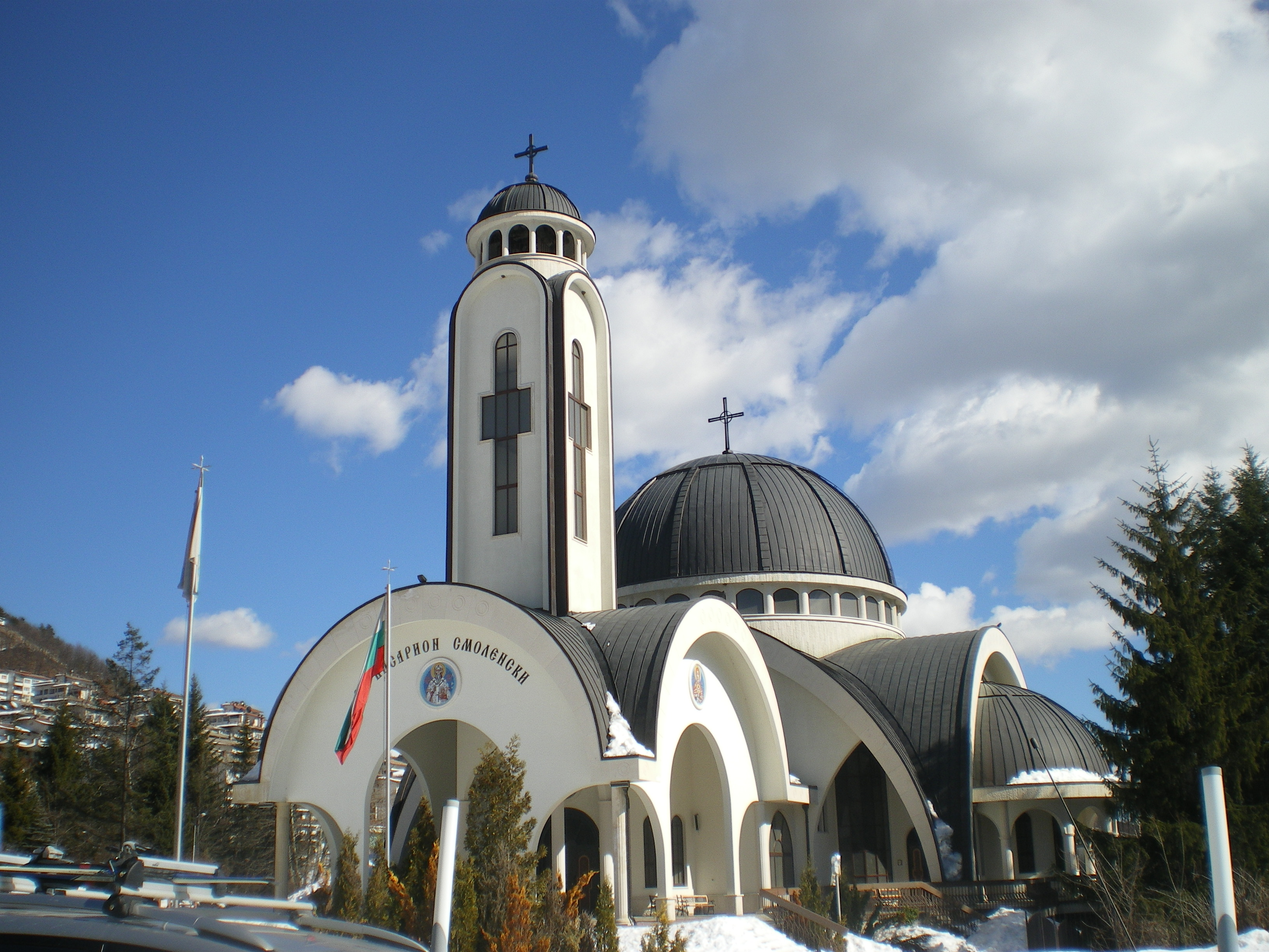 "Свети Висарион Смоленски" е православна църква в град Смолян, България, осветена на 2 юли 2006 година.